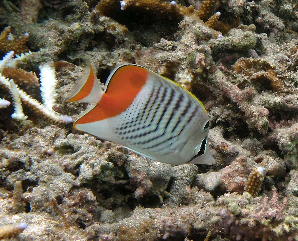 Un chétodon à damier (Chaetodon madagaskariensis) à la Réunion.